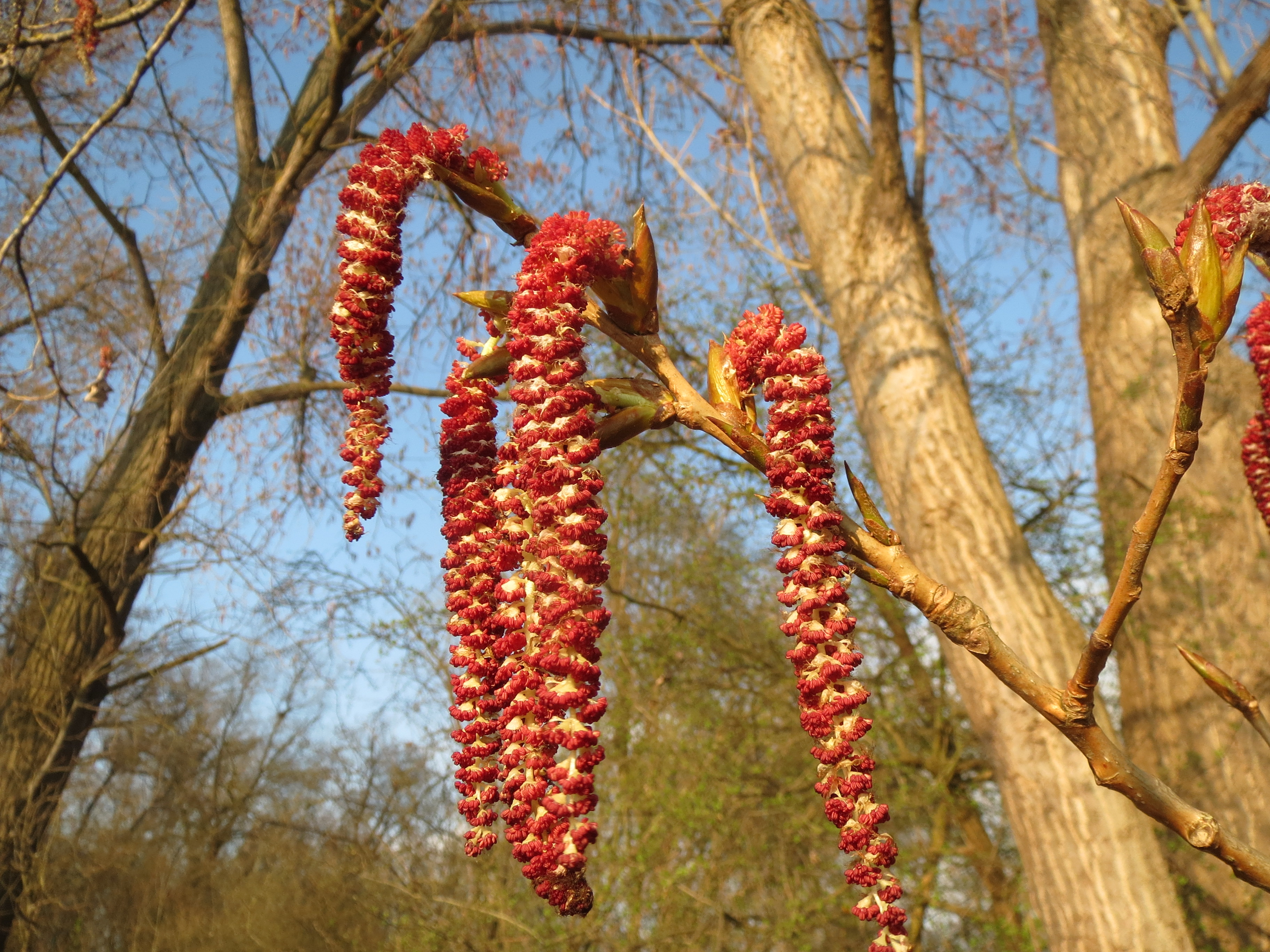 Hybrid-Pappel (Populus x canadensis) am Rhein bei Brühl